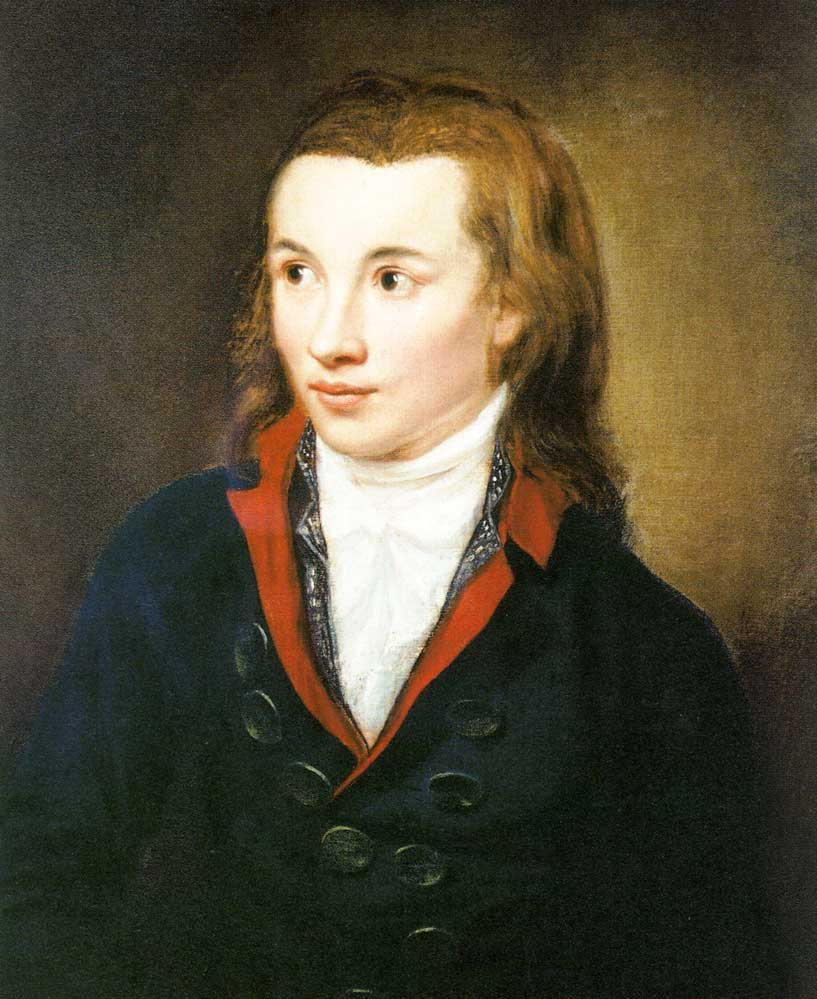 zeitgenössisches Gemälde von Novalis (1772-1801), eigentlich Georg Friedrich Philipp Freiherr von Hardenberg, war ein deutscher Schriftsteller der Frühromantik, Philosoph und Bergbauingenieur. Maler unbekannt (?)